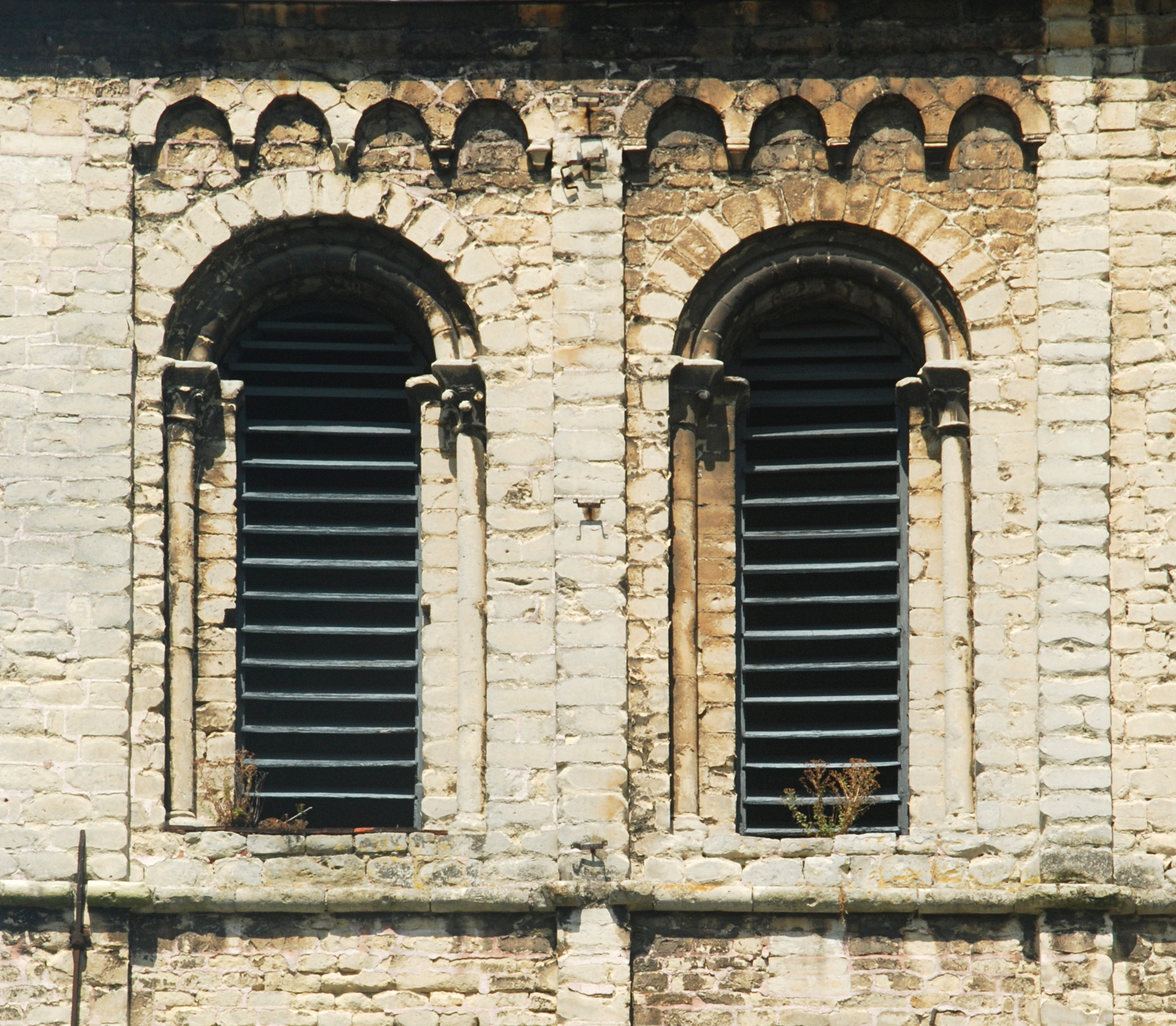 Belgique - Brabant flamand - Louvain (Leuven) - Église Saint-Jacques (Sint-Jacobskerk)